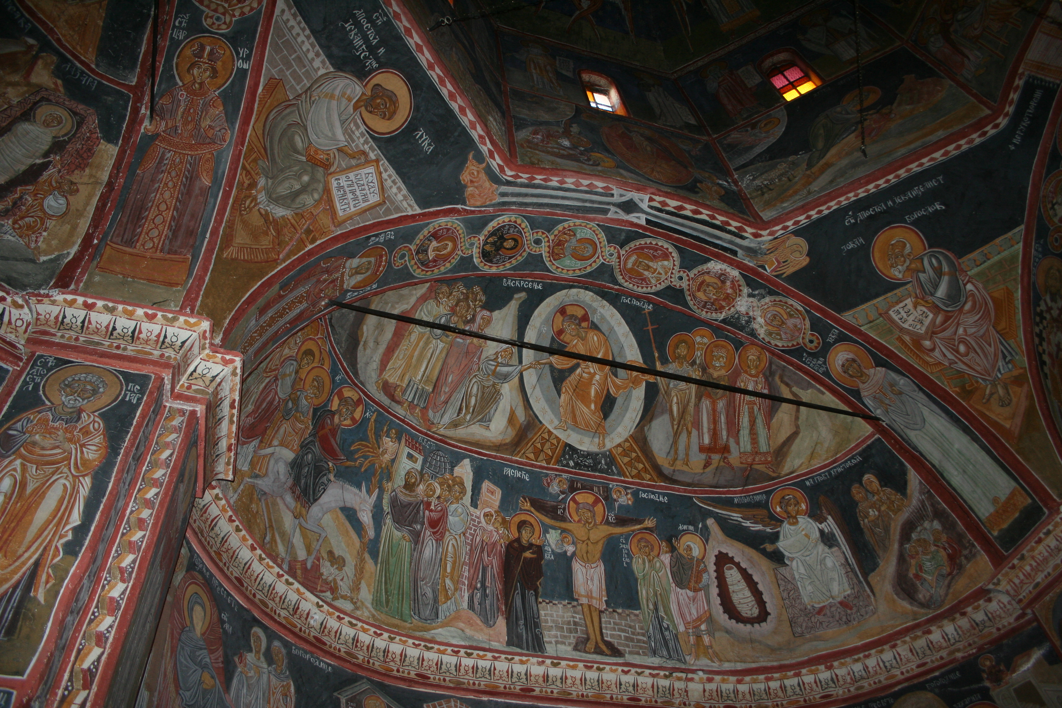 Crkva Prenosa moštiju Sv. Nikolaja, Mačvanska Mitrovica